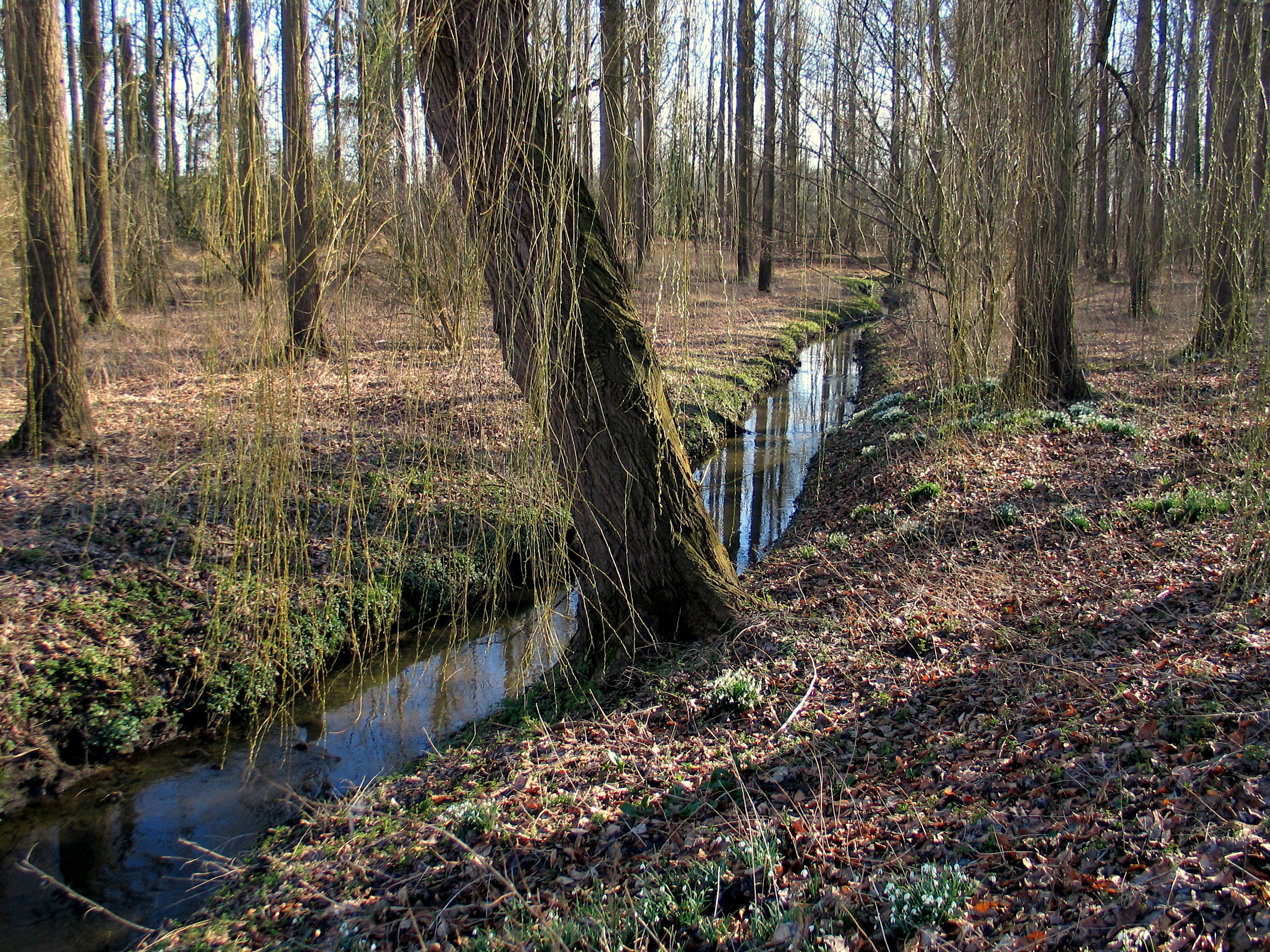 Mombeek tussen Widooie en Bommershoven in België